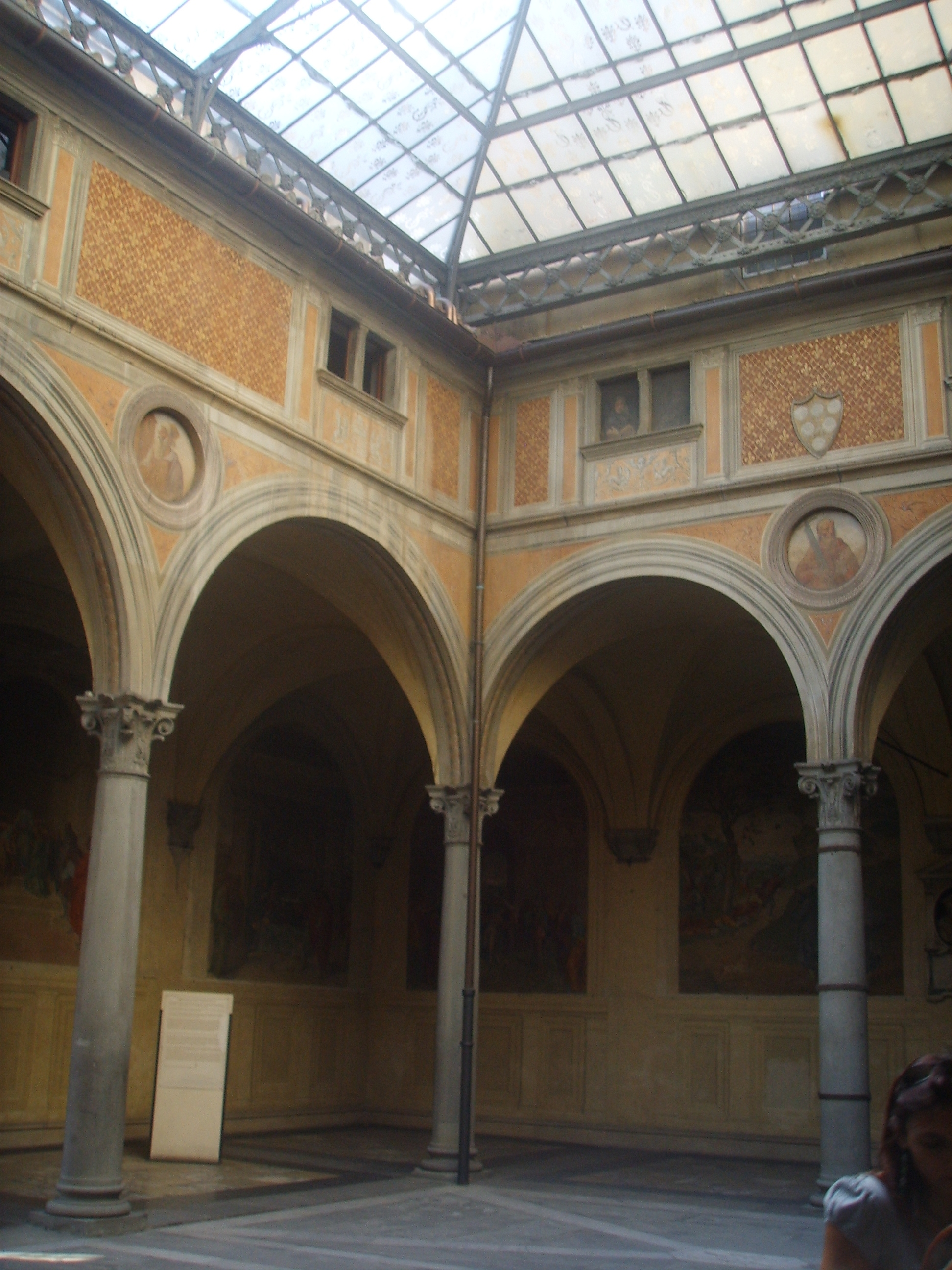 Santissima annunziata chiostrino dei Voti in Florence, italy